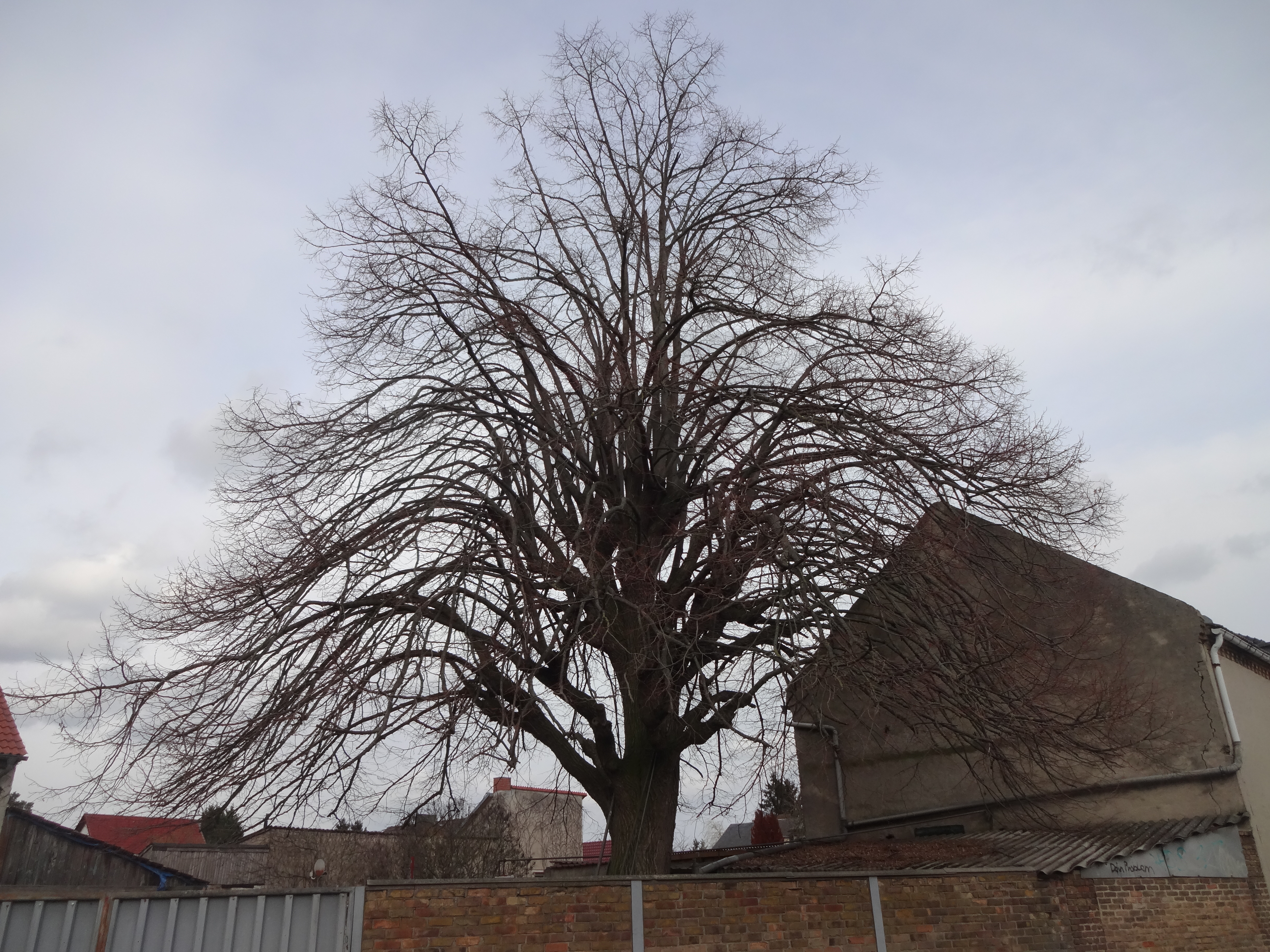 als Naturdenkmal geschützte Linde in der Mühlenstraße 7 in Damsdorf